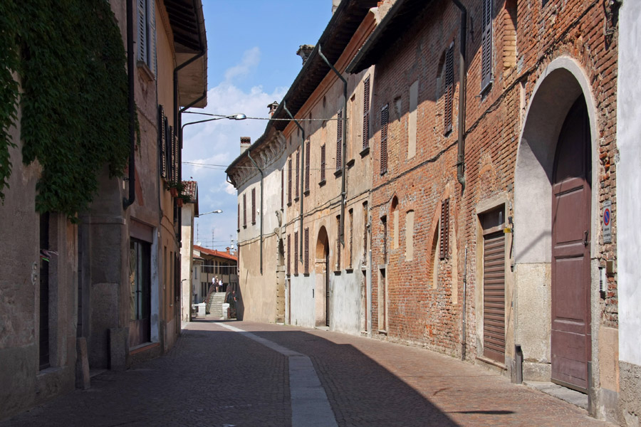 Via Matteotti a Robecco sul Naviglio (MI), sulla sinistra il complesso di Villa Gaia, sullo sfondo il Ponte degli scalini